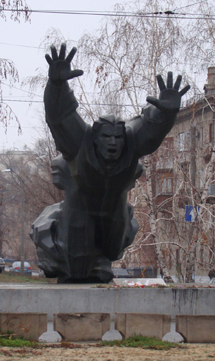 Памятник Паникахе. Краснооктябрьский район Волгограда. Россия